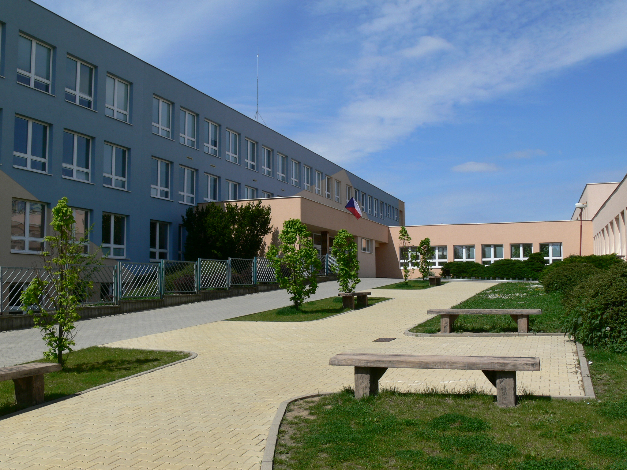 Dědice, Základní škola Letní pole